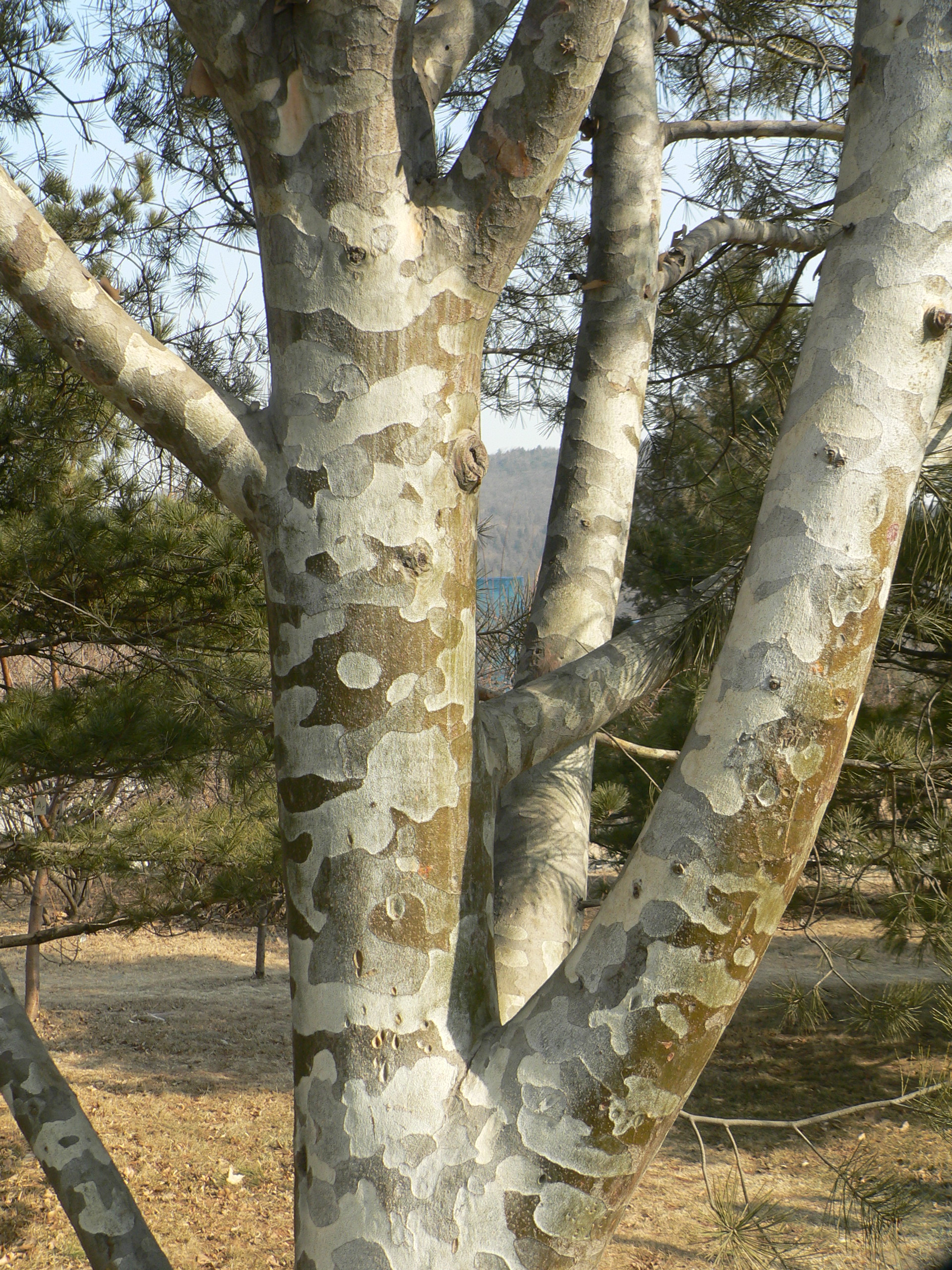 白皮松